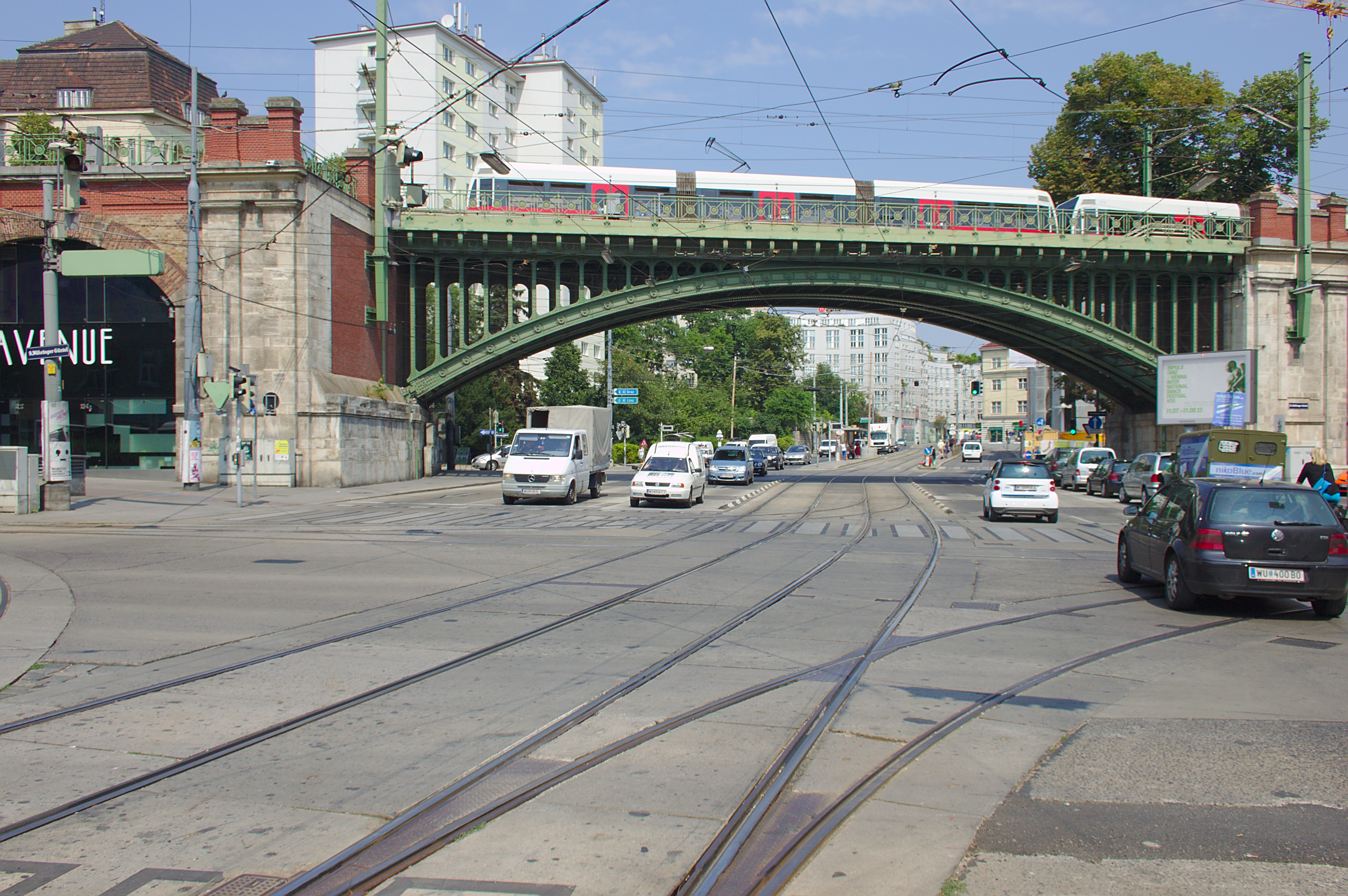 ehem. Stadtbahn - Teilbereich der heutigen U6Esperanto: Ponto de la metrolinio U6, ĉe la kruciĝo de la Viena Zono kun la stratoj Nussdorfer Straße kaj Döblinger Hauptstraße, rigardate de Nussdorfer Straße